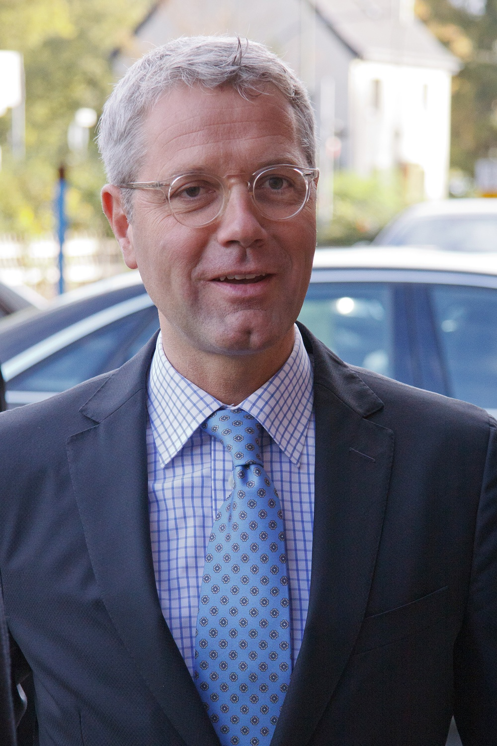 Reformkongress der CDU Nordrhein-Westfalen, Maximilianpark Hamm, Datum/Uhrzeit: 08.10.2011 10:12:16